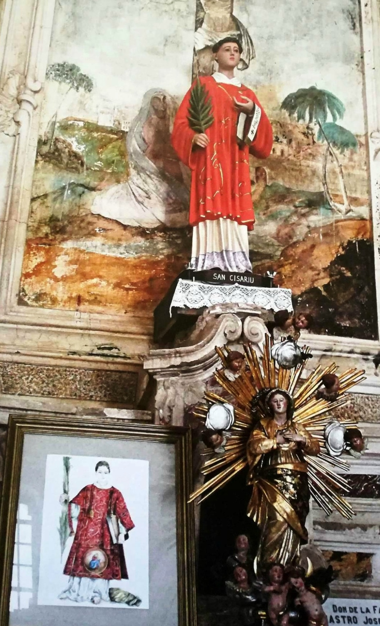 Statua di San Cesario diacono e martire, Église paroissiale de l'Annonciation, Piazzole d'Orezza (Corsica)